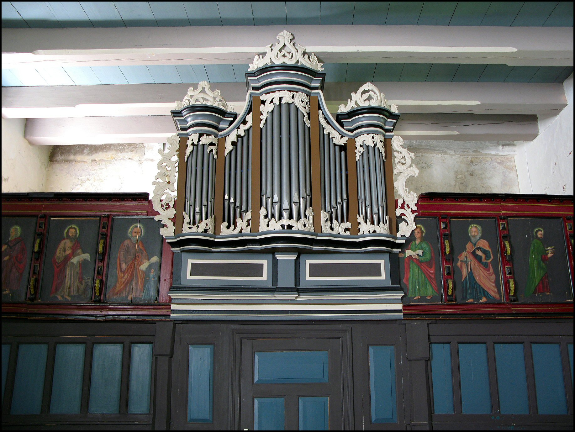 Orgel in der Kirche zu Wüppels